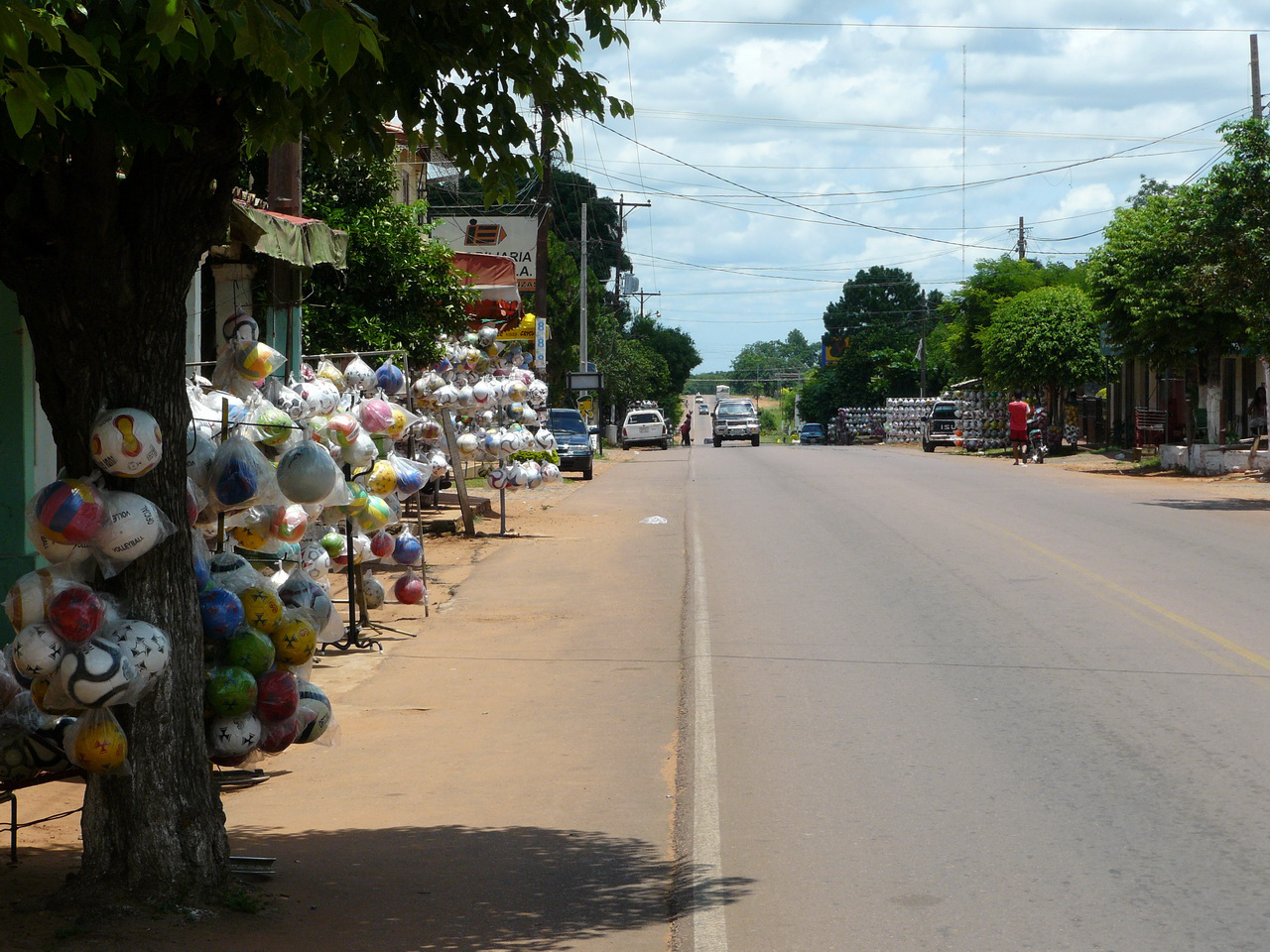 Fotos tomadas por mí, a inicios del año 2008 ruta principal de quiindy